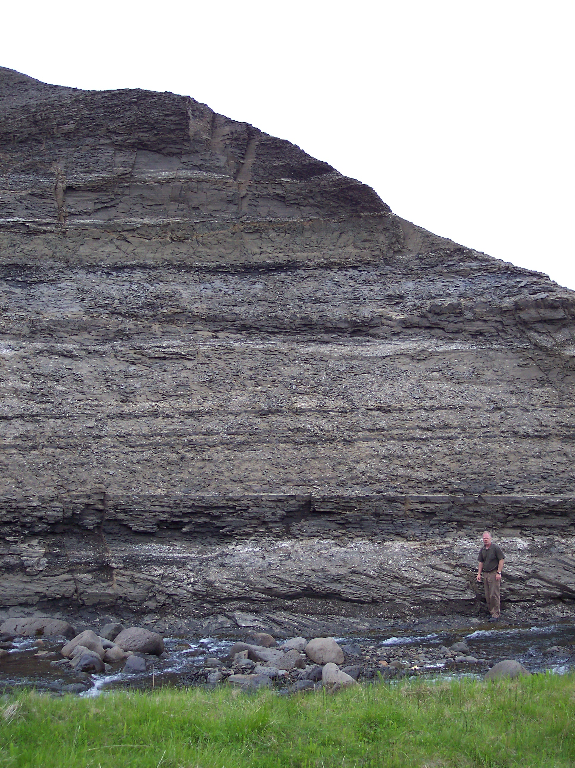 Tjörneslögin, Tjörnesi, Iceland